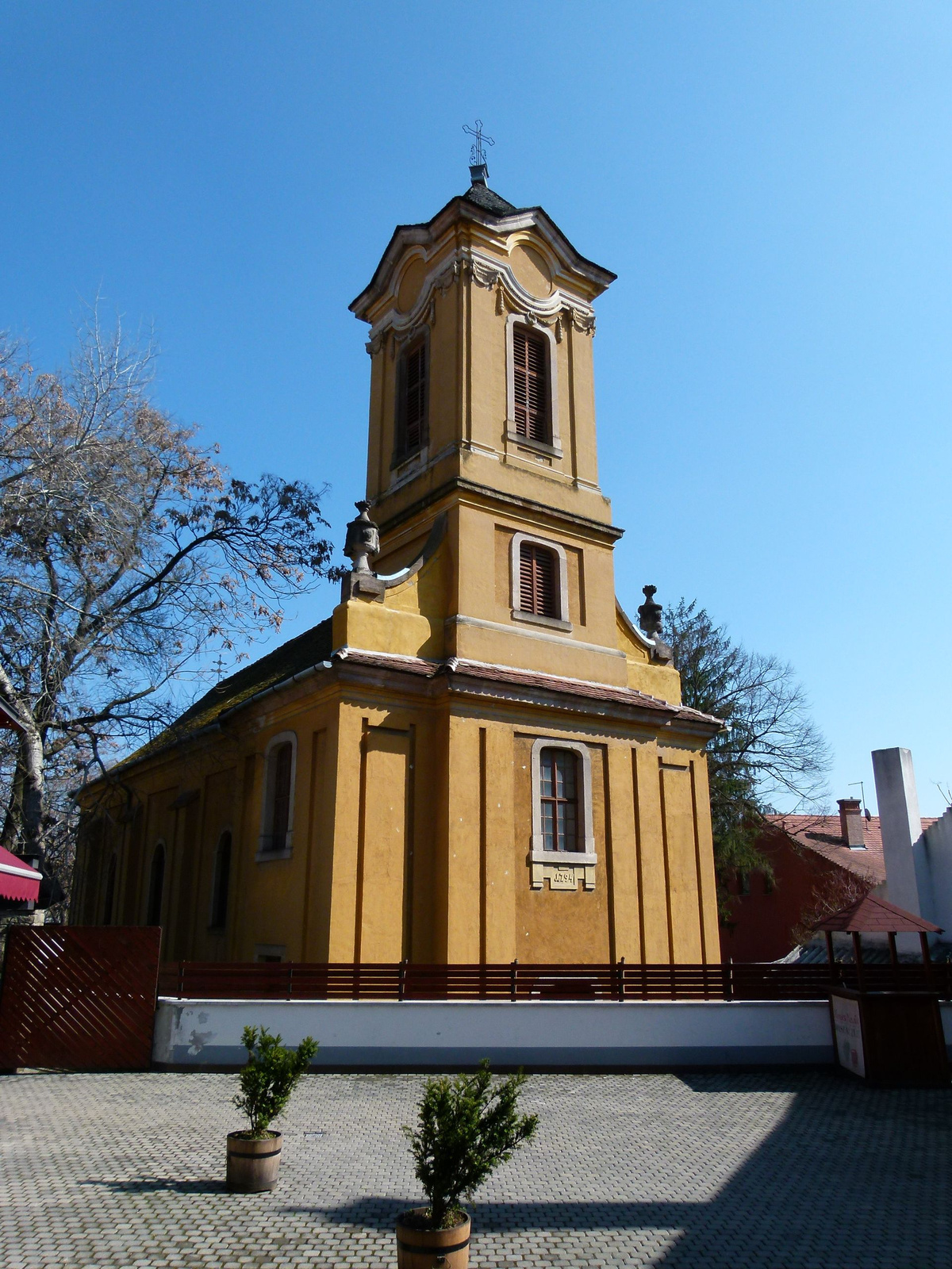 Pozsarevacska-templom (Szentendre, Kossuth u. 1.) This is a photo of a monument in Hungary. Identifier: 7382